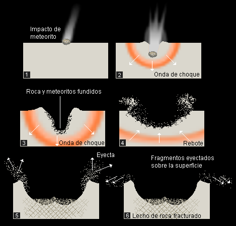 Descripción: formación de un cráter de impacto. Autor: Luis María Benítez Nota: su autor publica esta imagen bajo dominio público